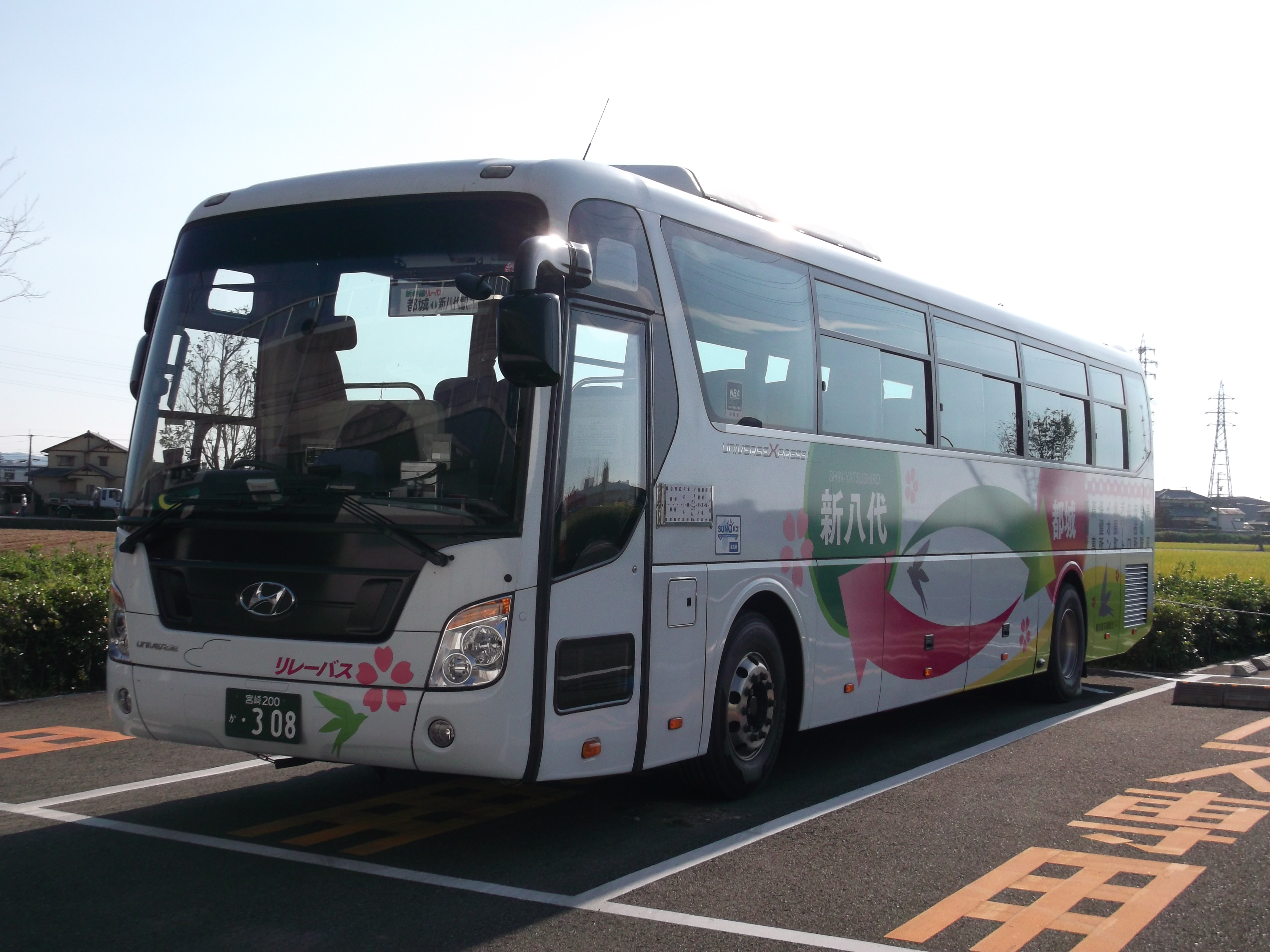 鹿児島交通観光バス「新幹線リレーバス」（新八代駅周辺にて）